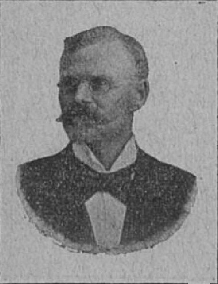 Antonín Maděra (1846-?), rakouský a český právník a politik